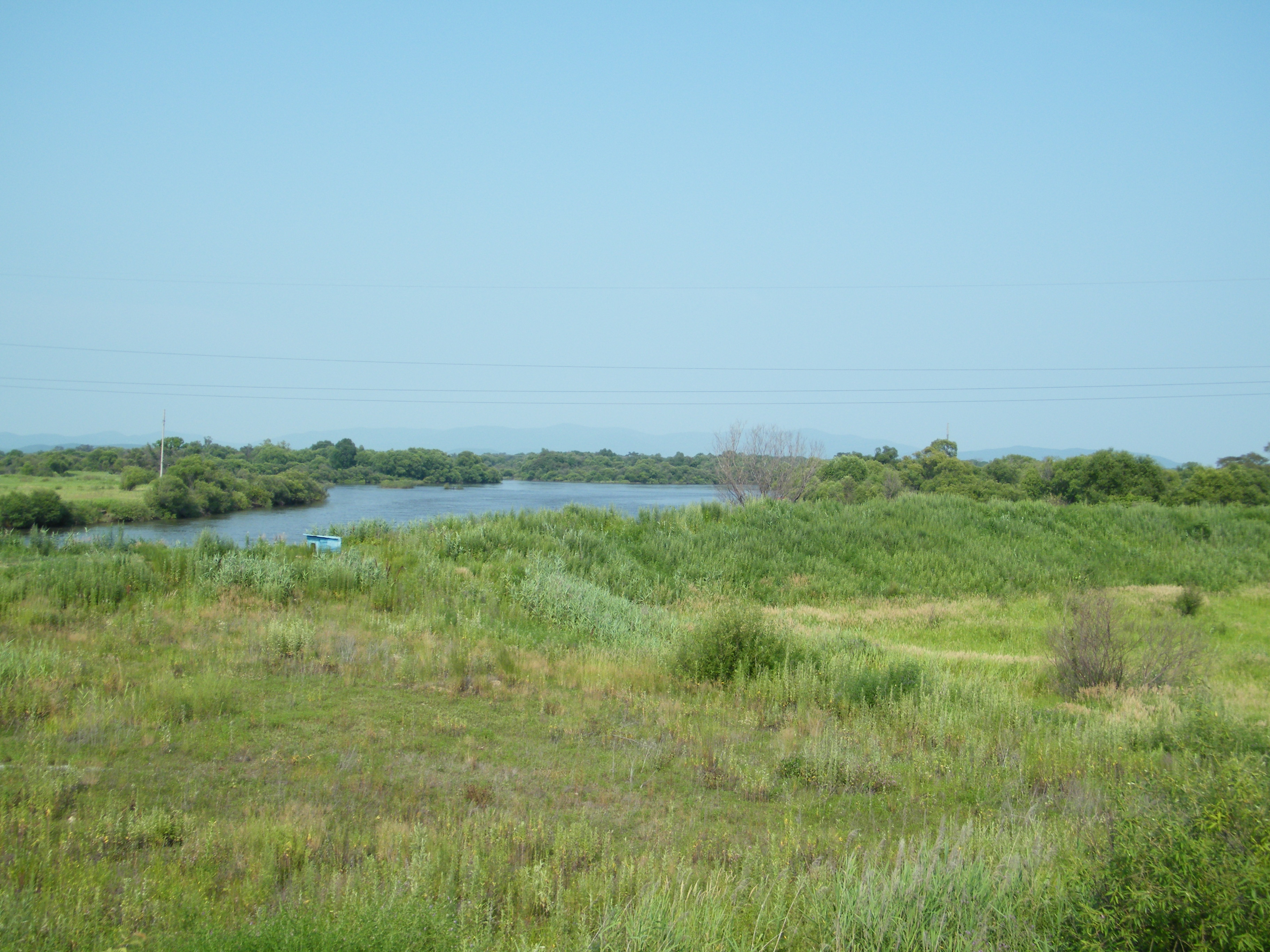 Река Большая Уссурка в районе автомобильного моста на трассе М60.